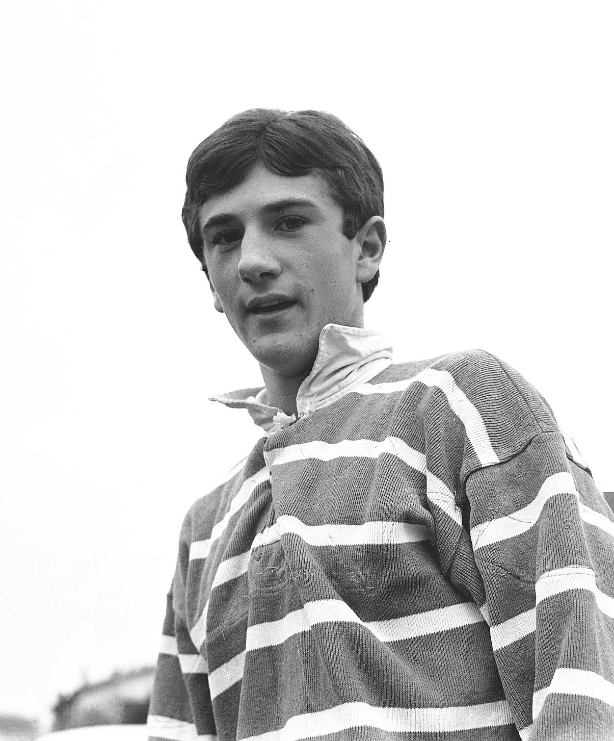 Stade du TOEC. Le 17 Octobre 1965. Vue de Richard Astre lors du match TOEC-Grenoble.